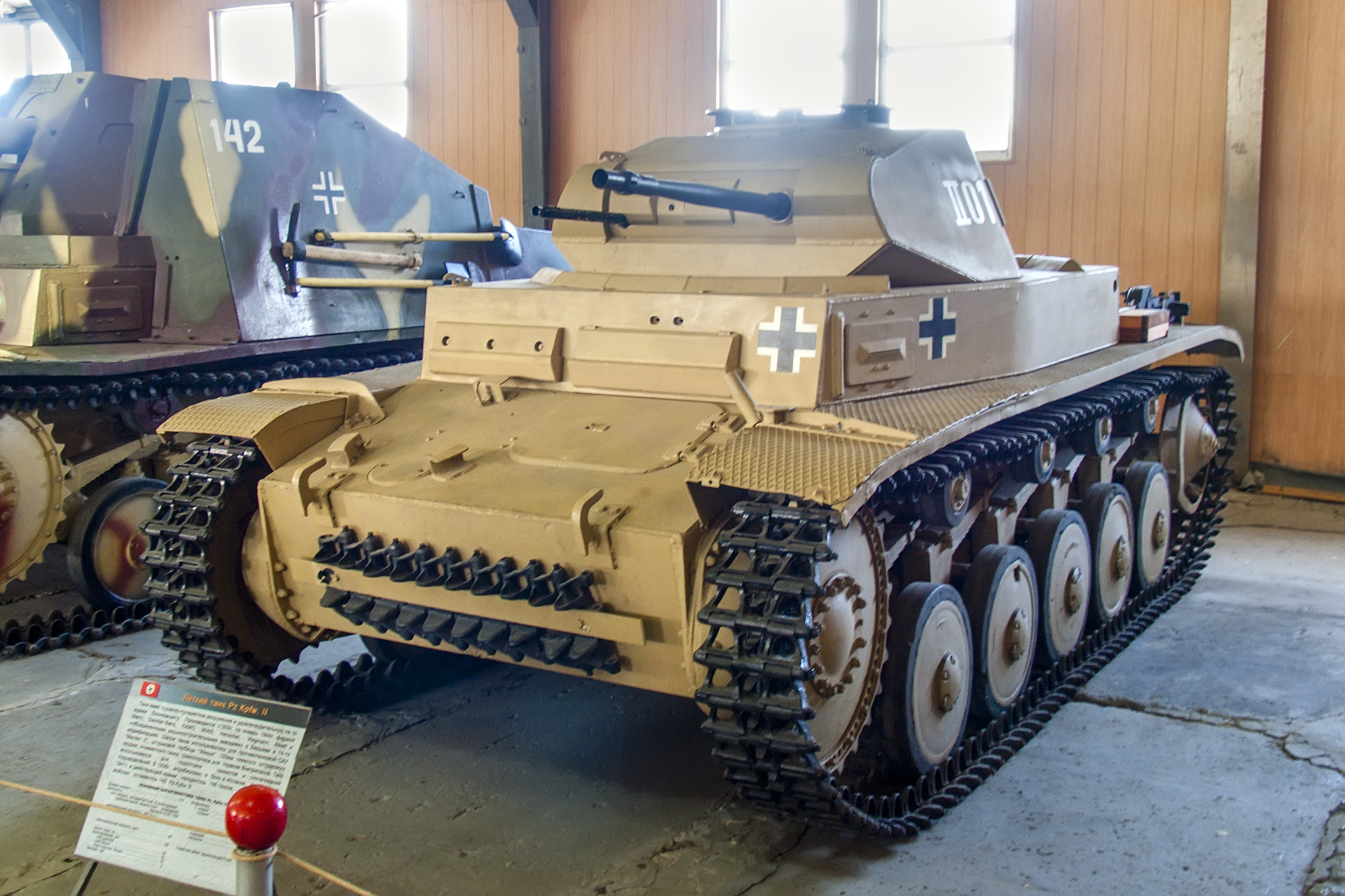 Легкий танк Pz.Kpfw II в Центральном музее бронетанкового вооружения и техники в Кубинке.